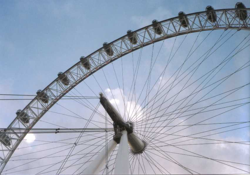 London Eye overdag, eigen foto 21-10-04